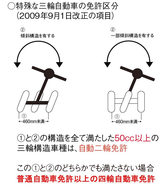 2009年9月1日道交法一部改正図説